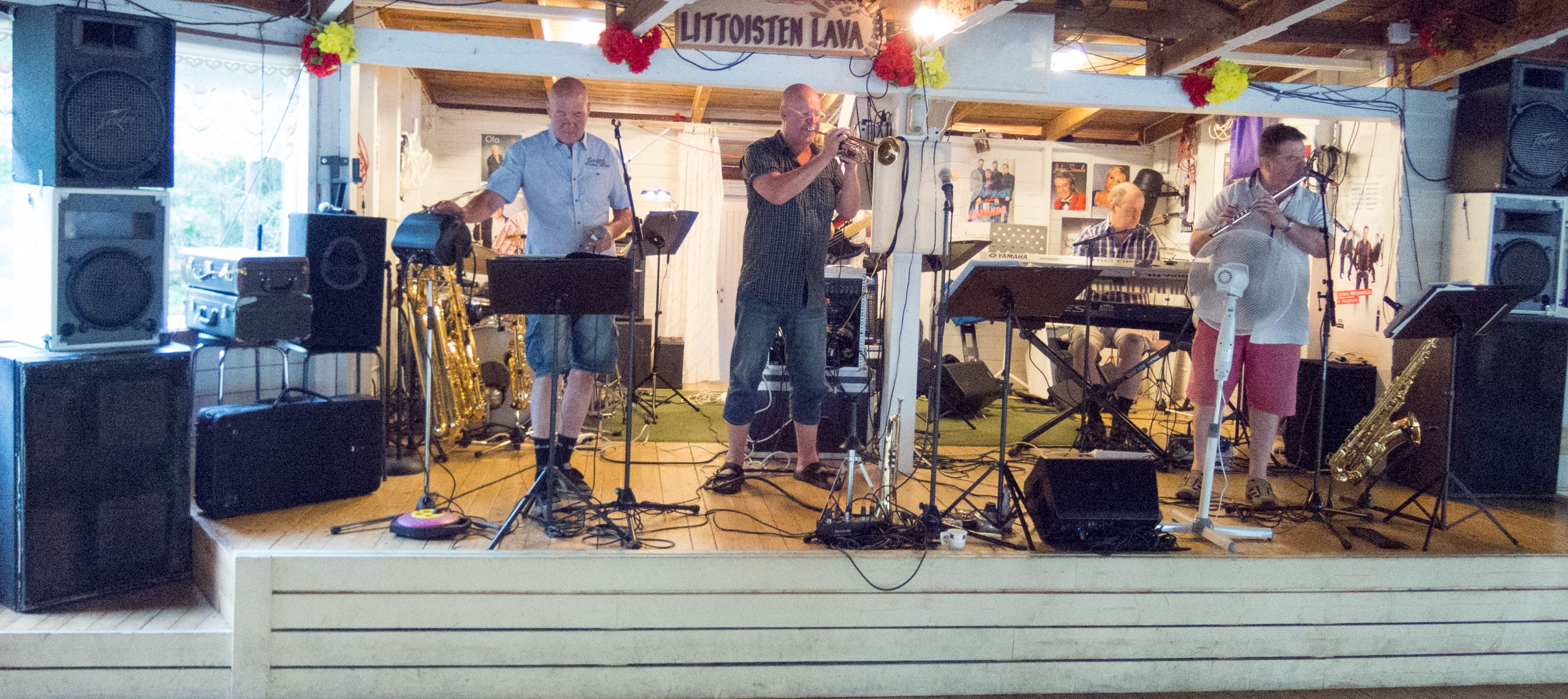 Seitsemän seinähullua veljestä